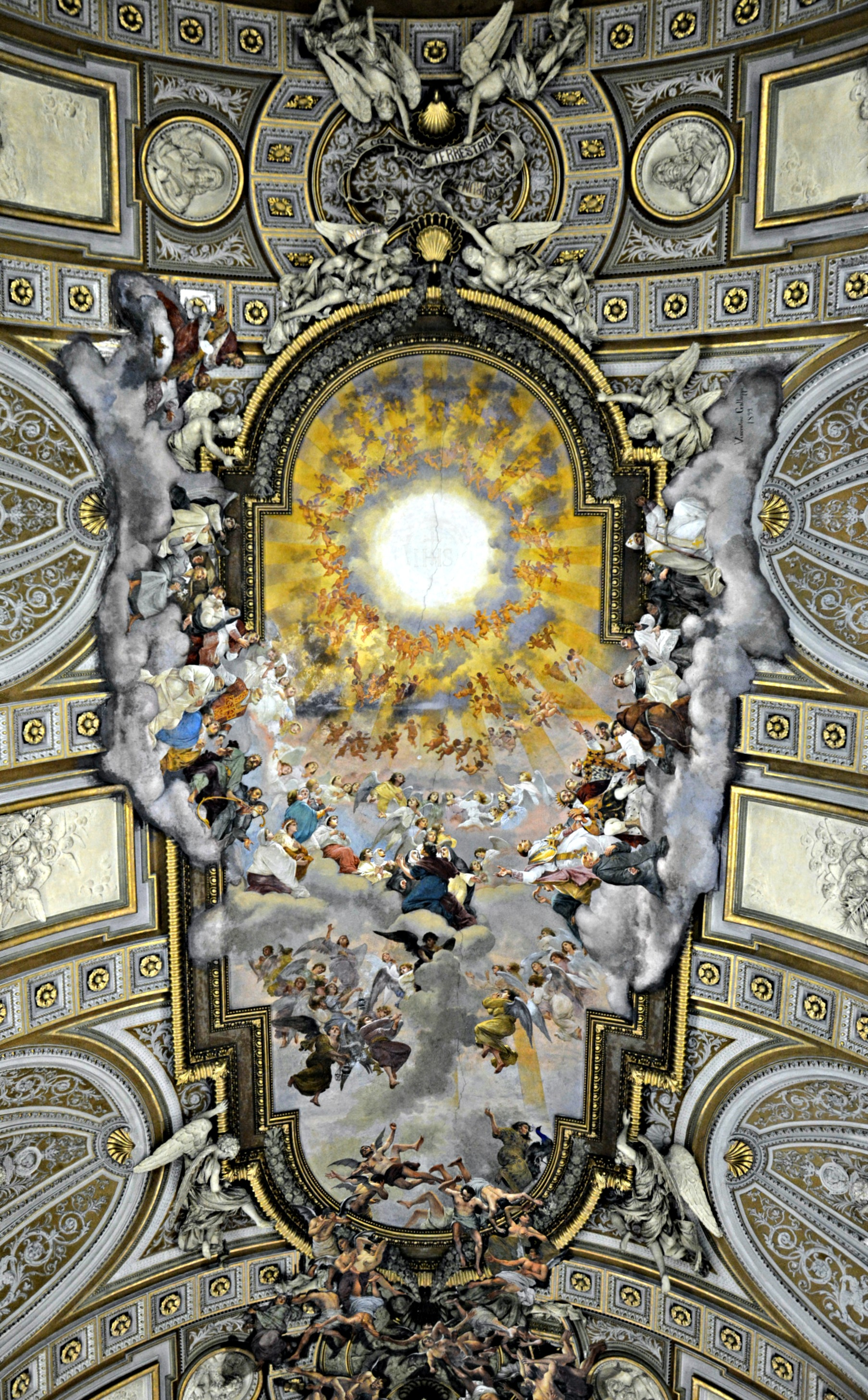 Vedi titolo